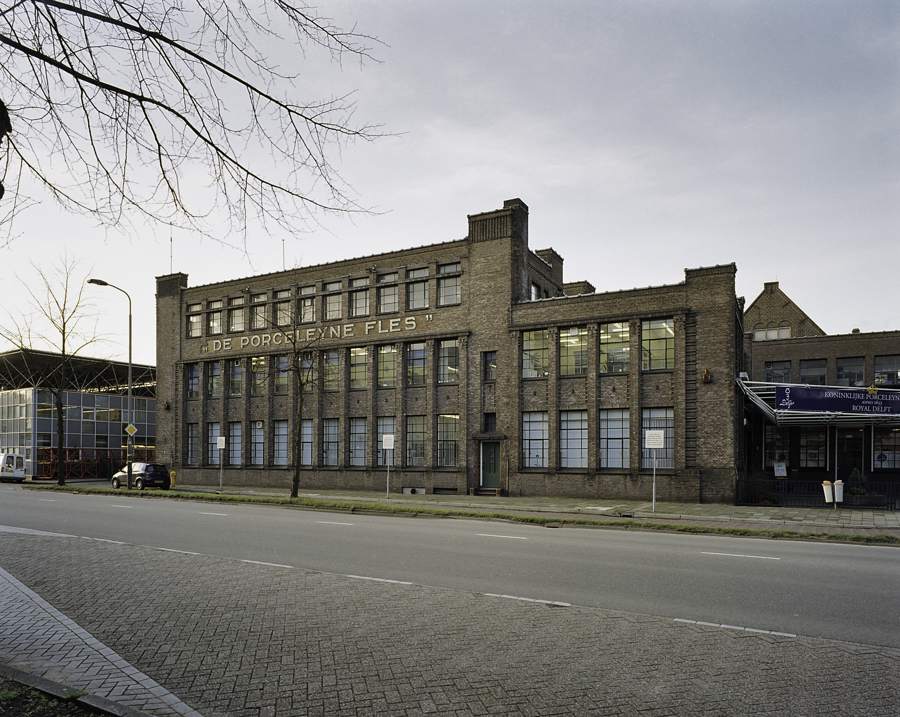 Fabriek De Porceleijne Fles: Overzicht voorgevel (opmerking: Gefotografeerd voor Monumenten In Nederland Zuid-Holland)